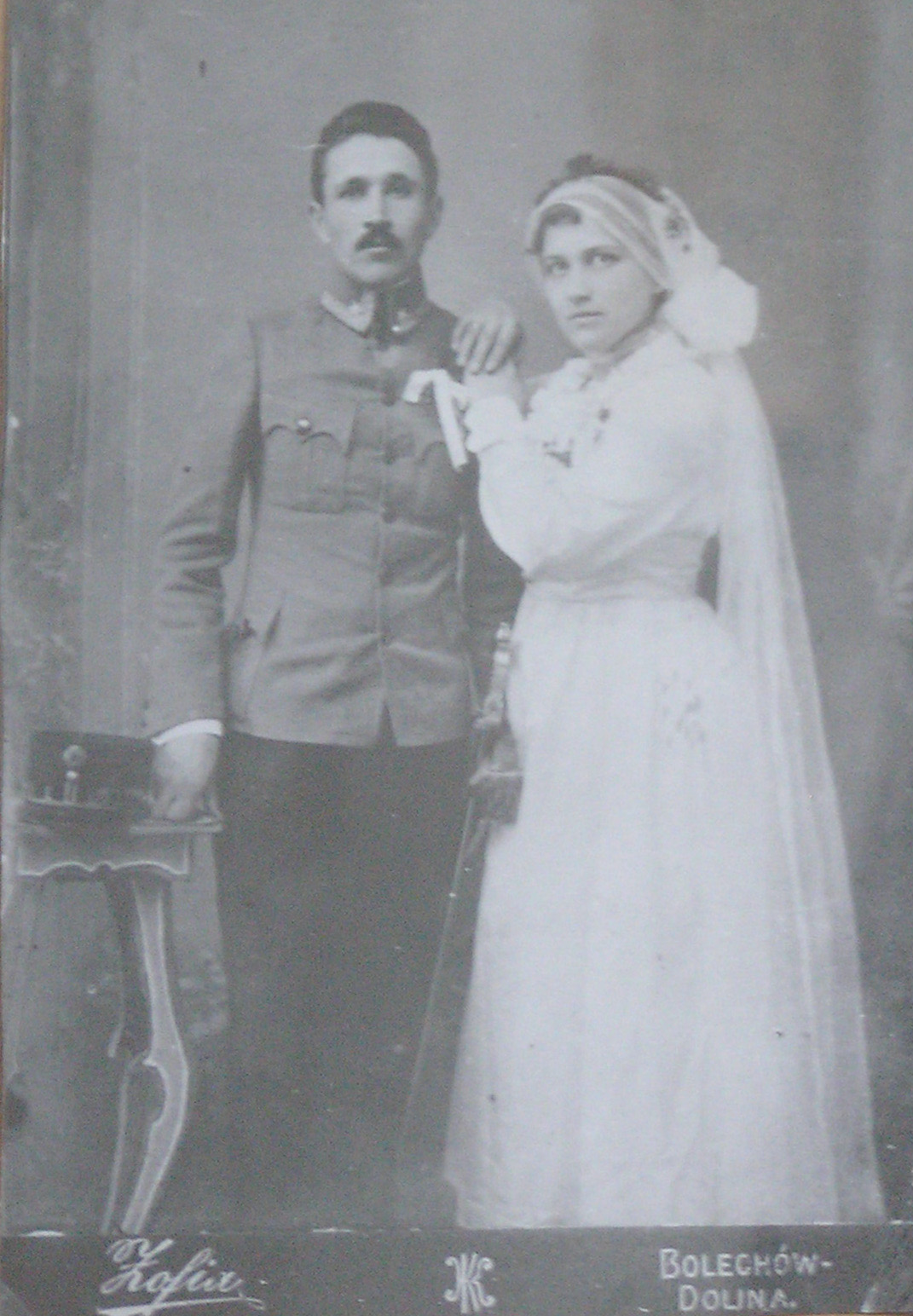 Моґетич Роман та Єва